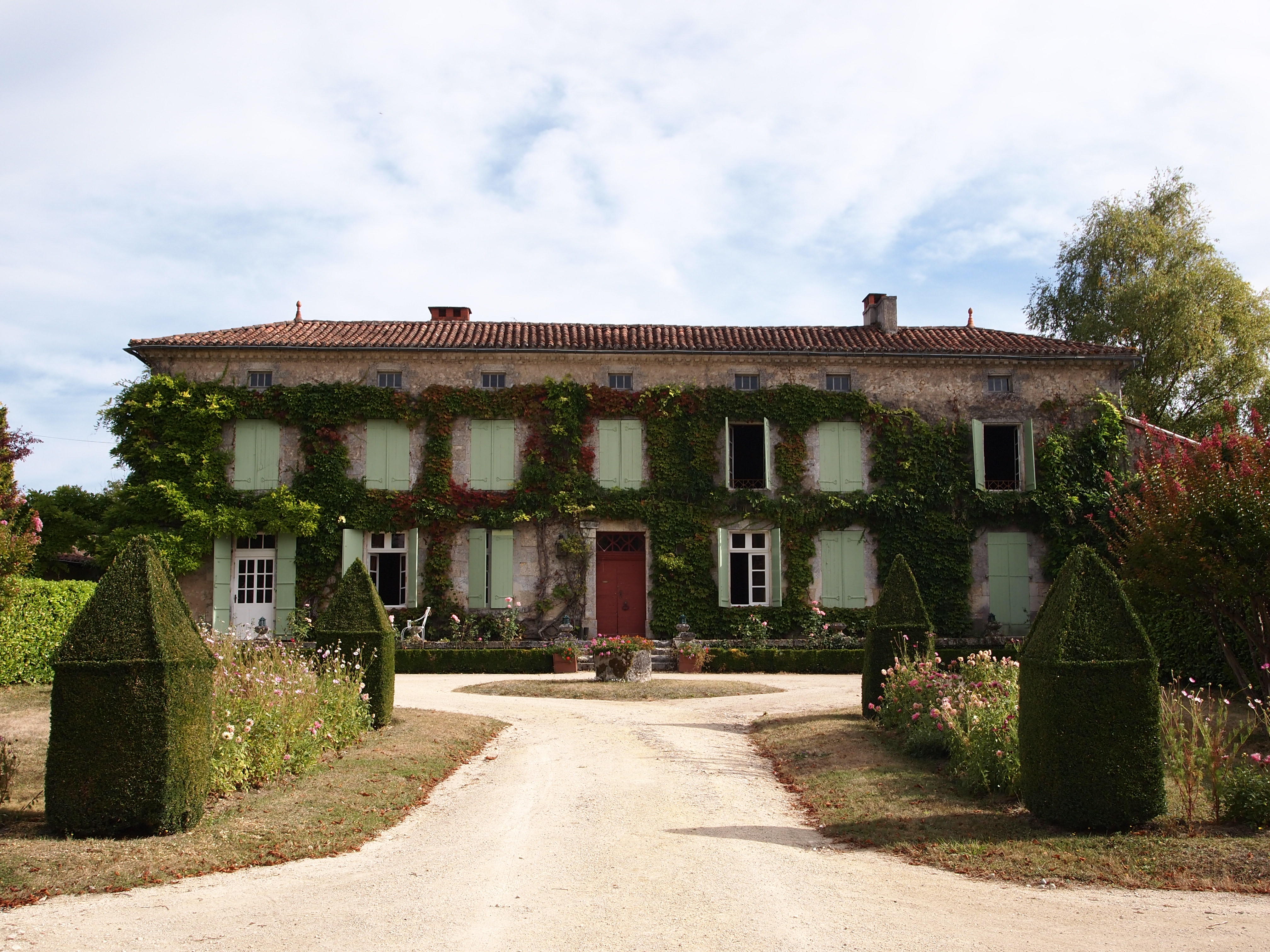 Logis de Chênard, à Chavenat (inscrit, 1992)